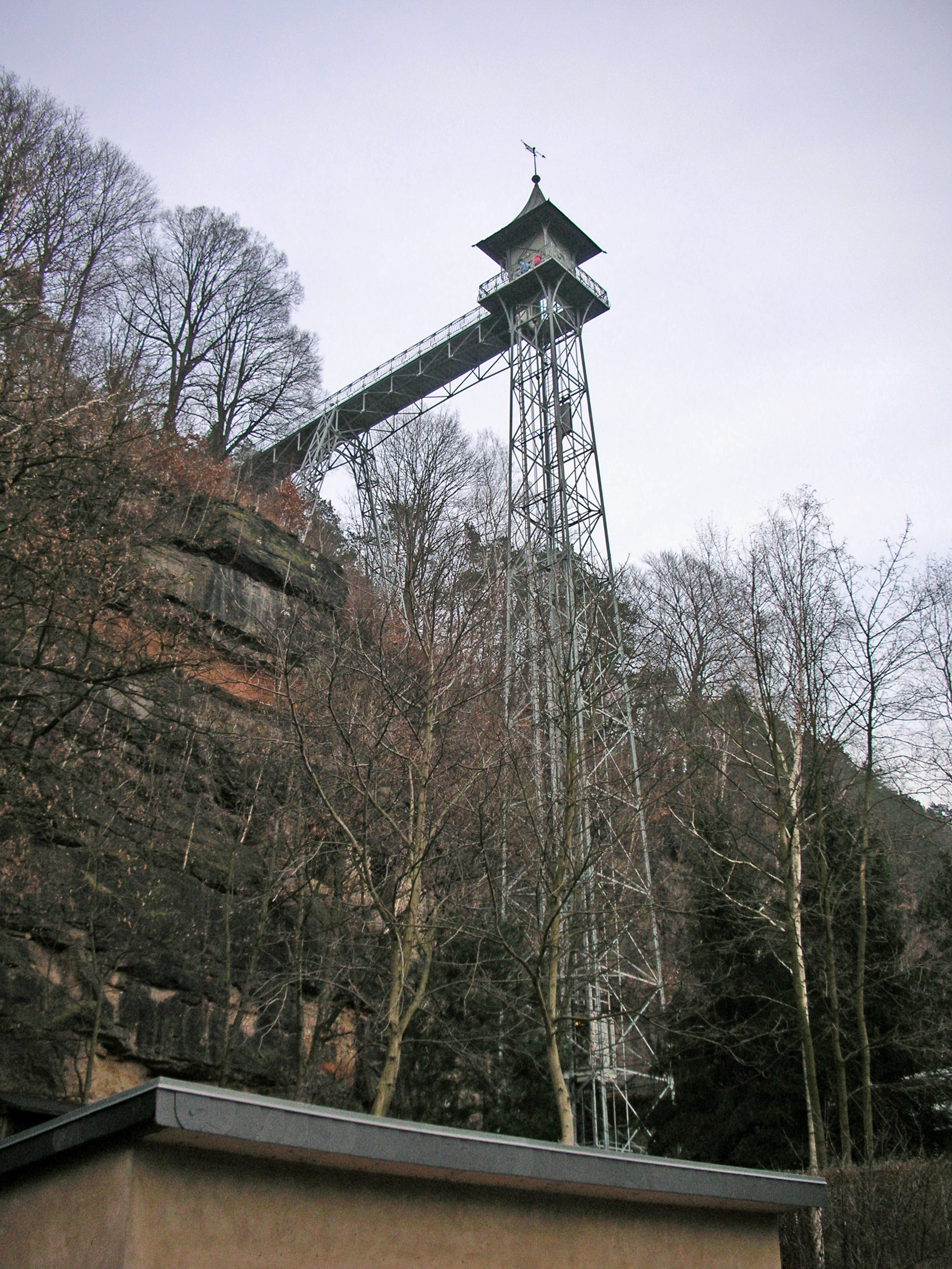 Elektrischer freistehender Personenaufzug in Bad Schandau, gebaut 1904, Plateauhöhe 50m, als Technisches Denkmal geschützt seit 1904, geschaffen von Rudolf Sendig